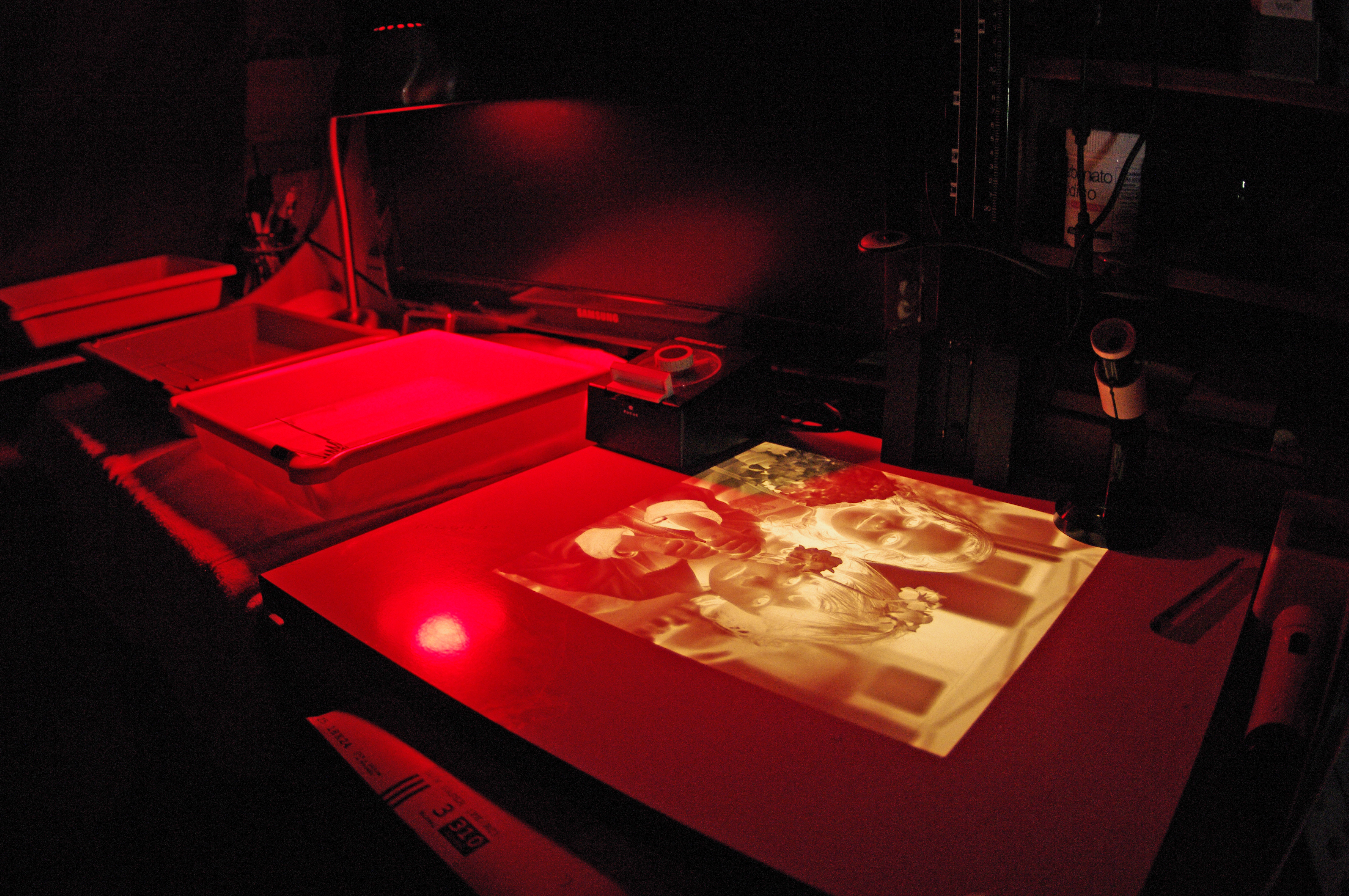 Laboratory